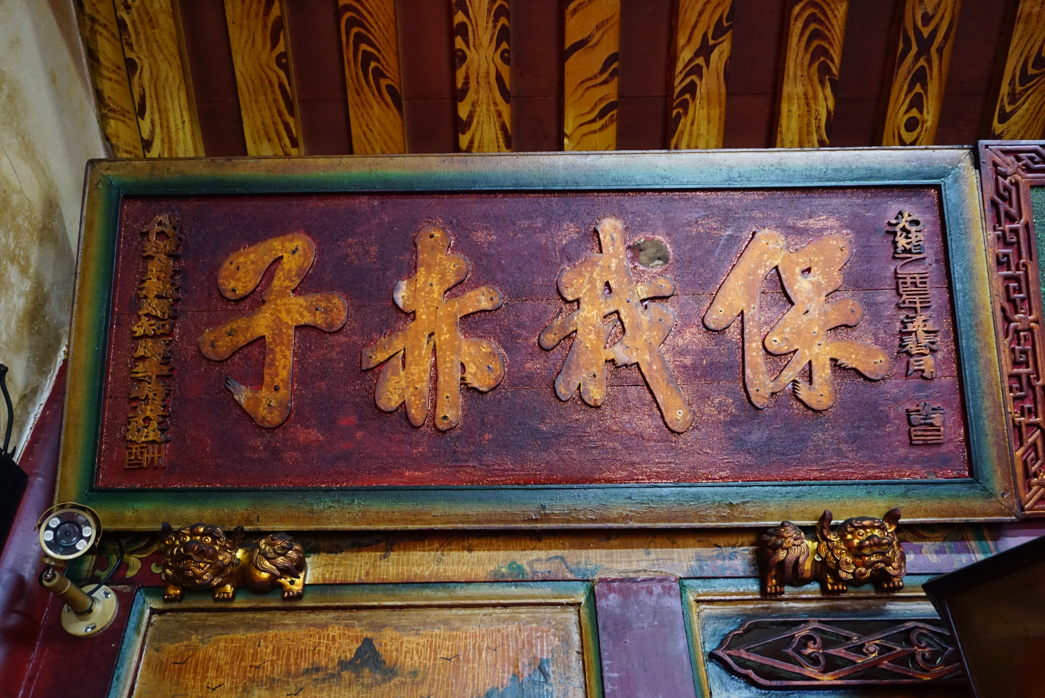 中文（台灣）: 新港大興宮「保我赤子」古匾，光緒乙酉年孟春月，代理嘉義縣知縣李時英敬酬